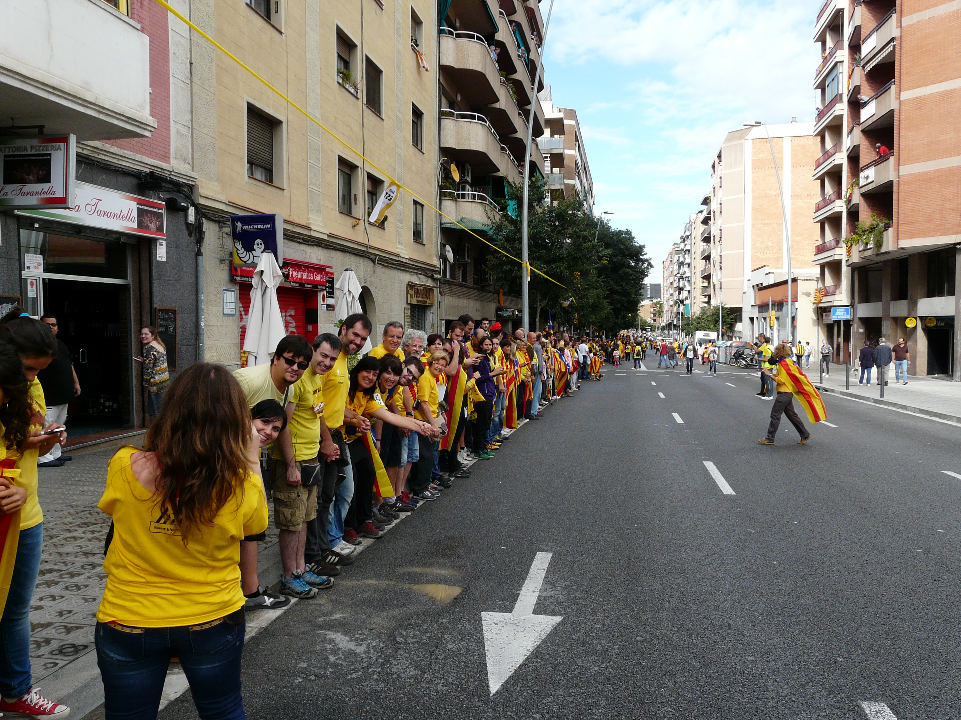 Via Catalana per la Independència. Abans, durant i després de la Via, a Barcelona i el Baix Llobregat.